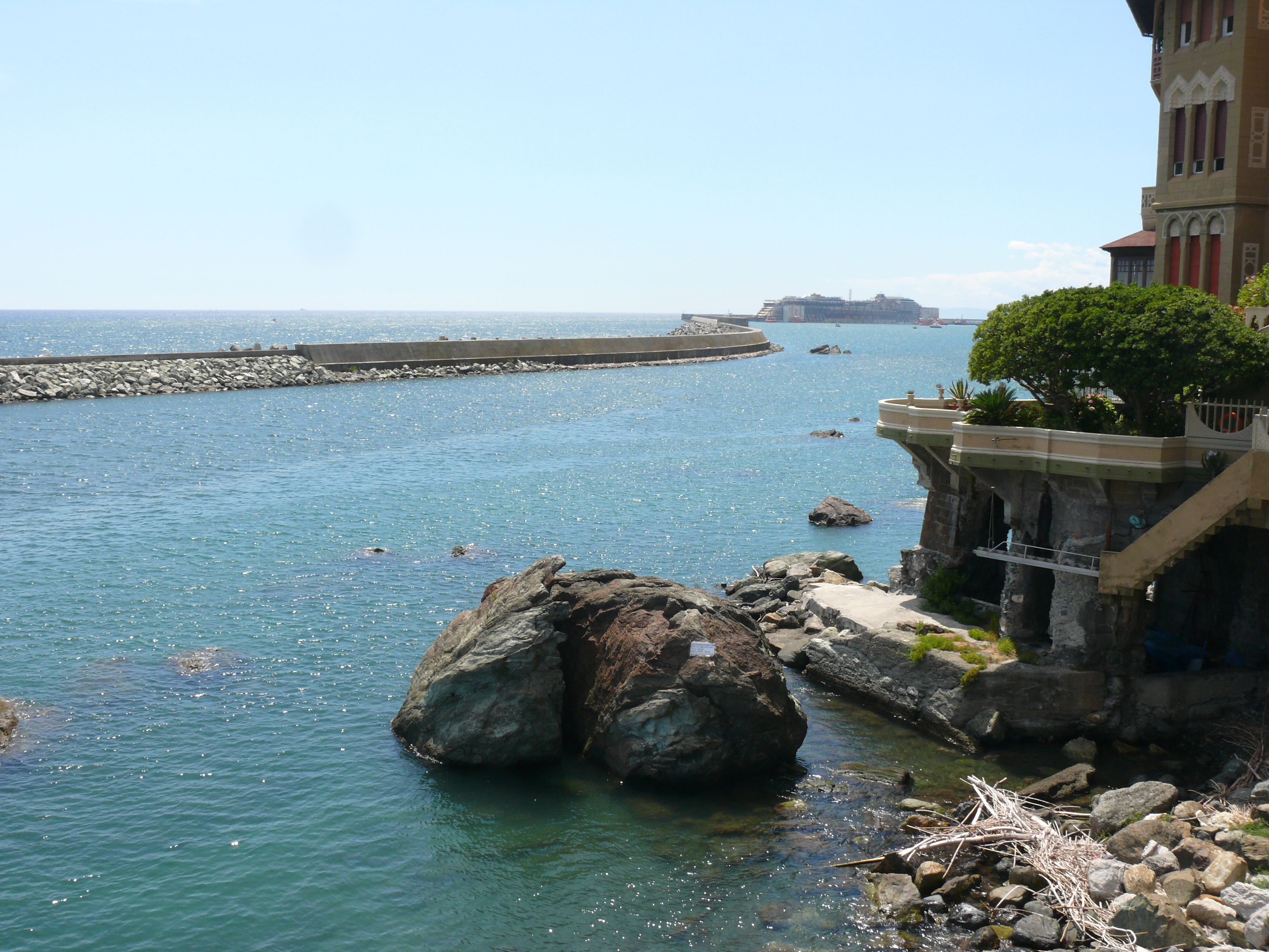 La Costa Concordia mentre viene ormeggiata nel porto di Prà-Voltri, vista dalla passeggiata di Pegli